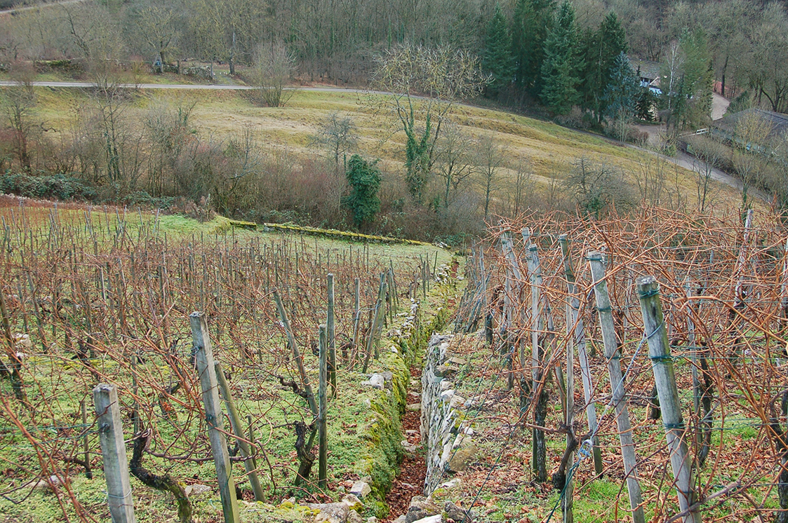 Markgröningen: Hohlweg-Relikte der Vorderen Steige am Schlüsselberg. Blick von der ehemaligen Schlüsselburg über die Weinberge am Schlüsselberg.